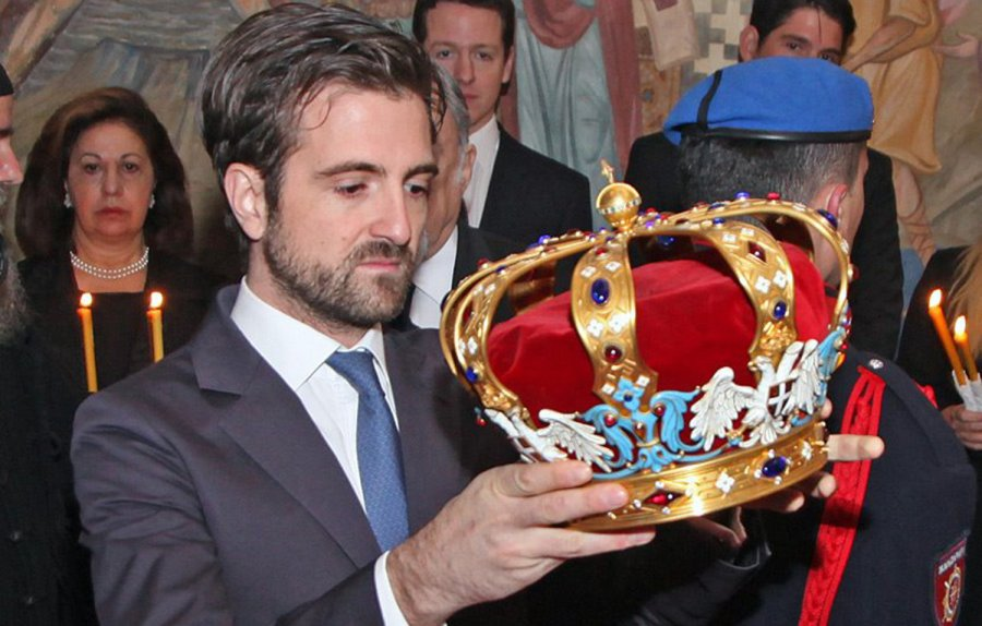 Његово Краљевско Височанство Принц Наследник Петар Карађорђевић